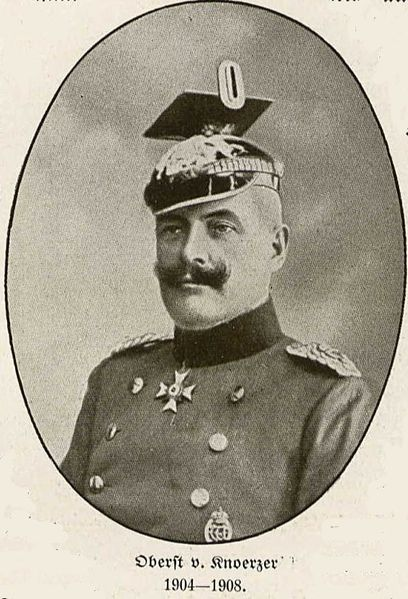 Карл Альберт (10.05.1858 - 04.06.1932) кавалерист Карл командував резервні піхотні дивізії і дивізією Ландвер під час Великої війни. У 1918 році він командував корпусом, який боровся в Україні на Східному фронті.